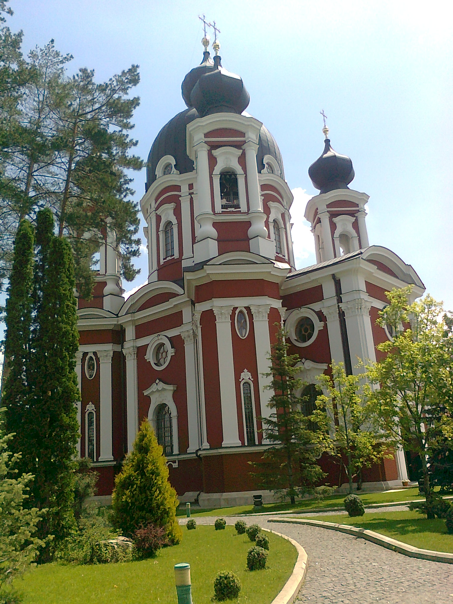 Курки — православный монастырь в Оргеевском районе Молдавии.